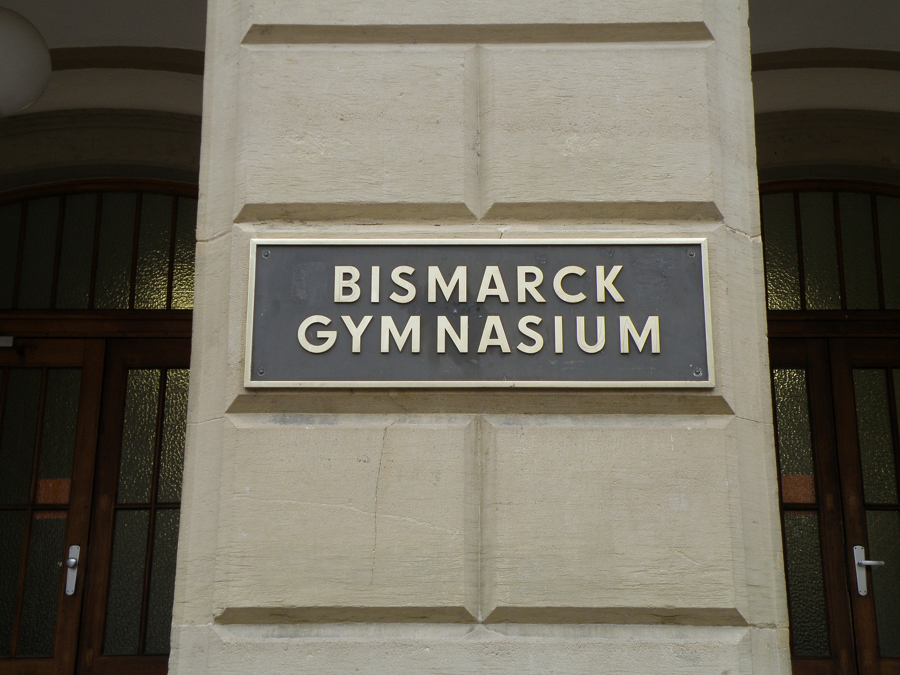 Bismarck-Gymnasium-Gedenktafel